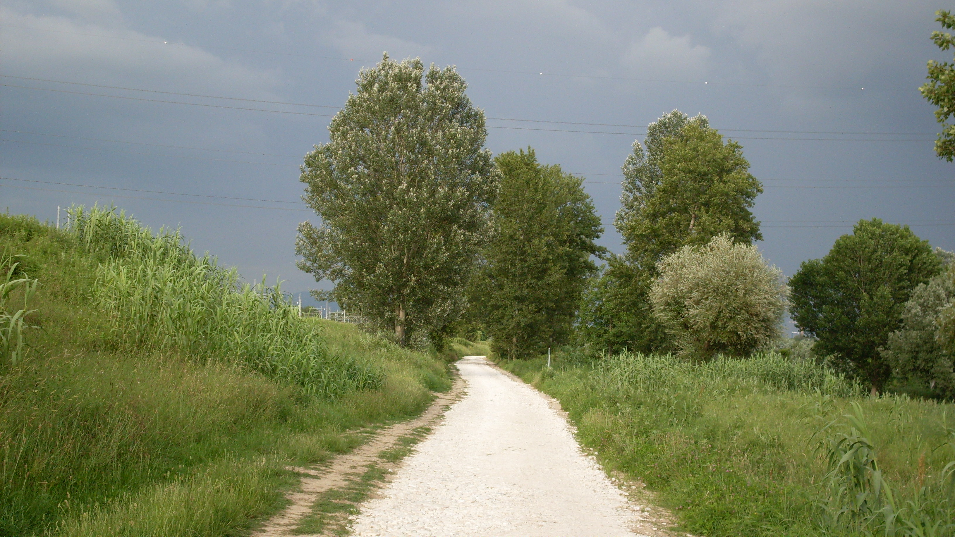 Pista Ciclabile Renai-Cascine - Signa (FI)